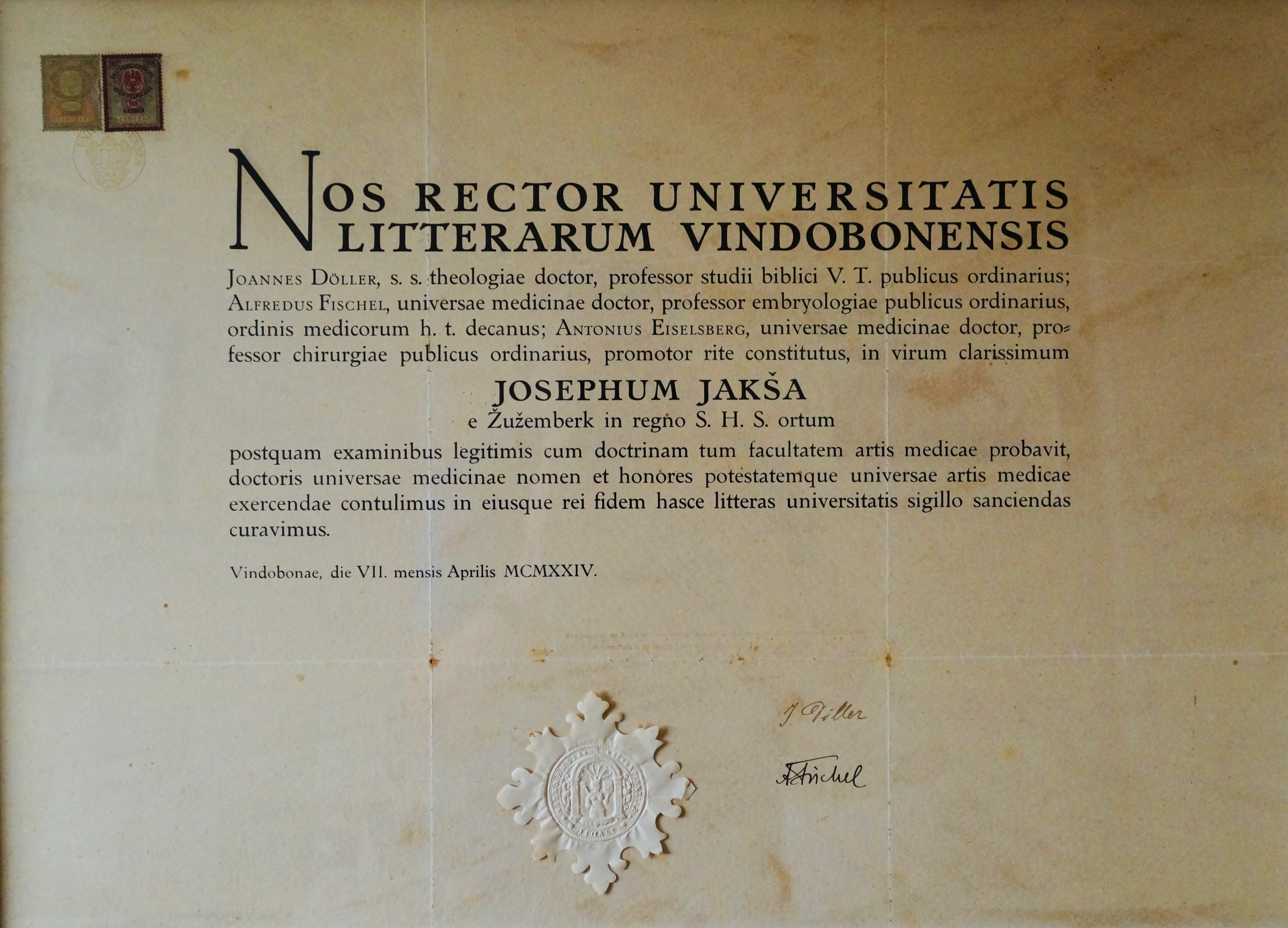 Diploma doktorja medicine Jožeta Jakše, Dunaj, 7. april 1924